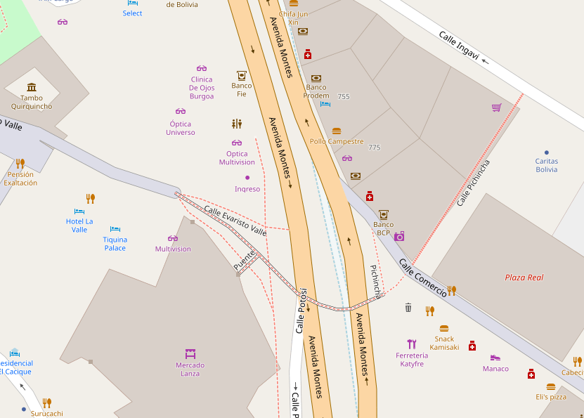 Pasarela Pérez Velasco en OpenStreetMap en febrero de 2019